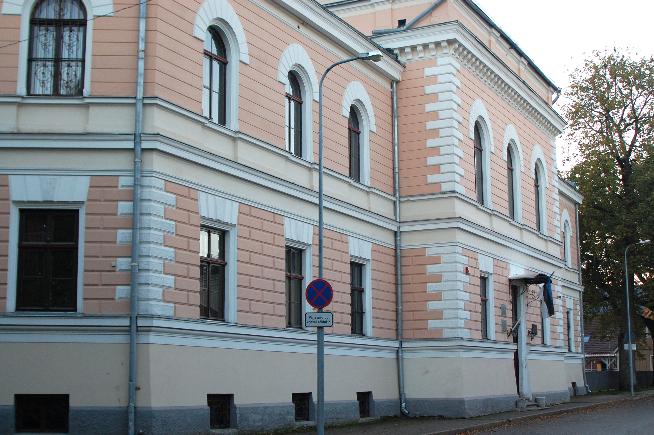 Viljandi kohtuhoone, 1895.a.